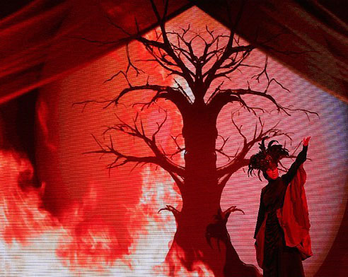 پردیس افکاری و تکنیک بک آٰرت بر فرس تندرو